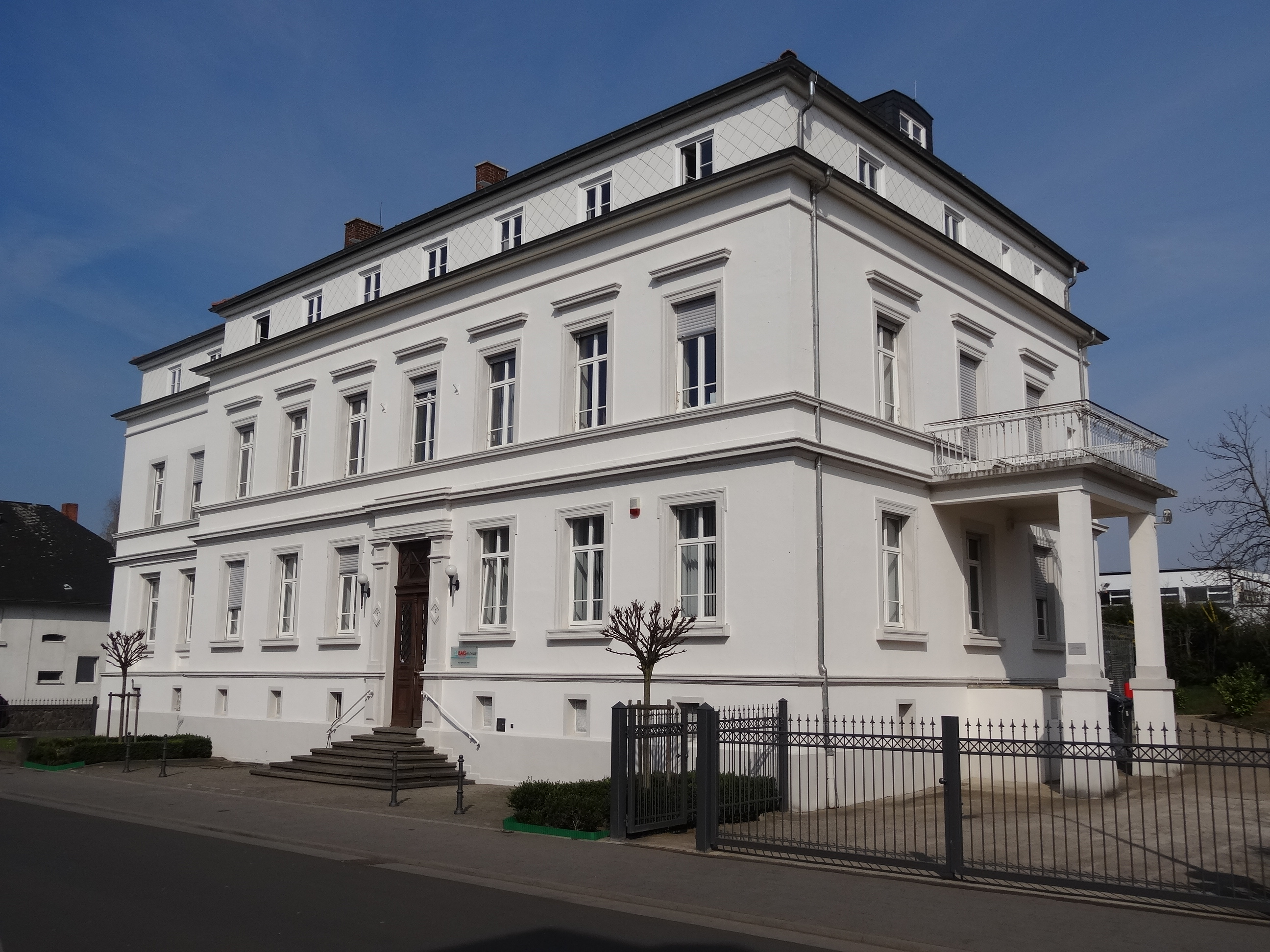 Amtsgerichtstraße 1 (Lich)